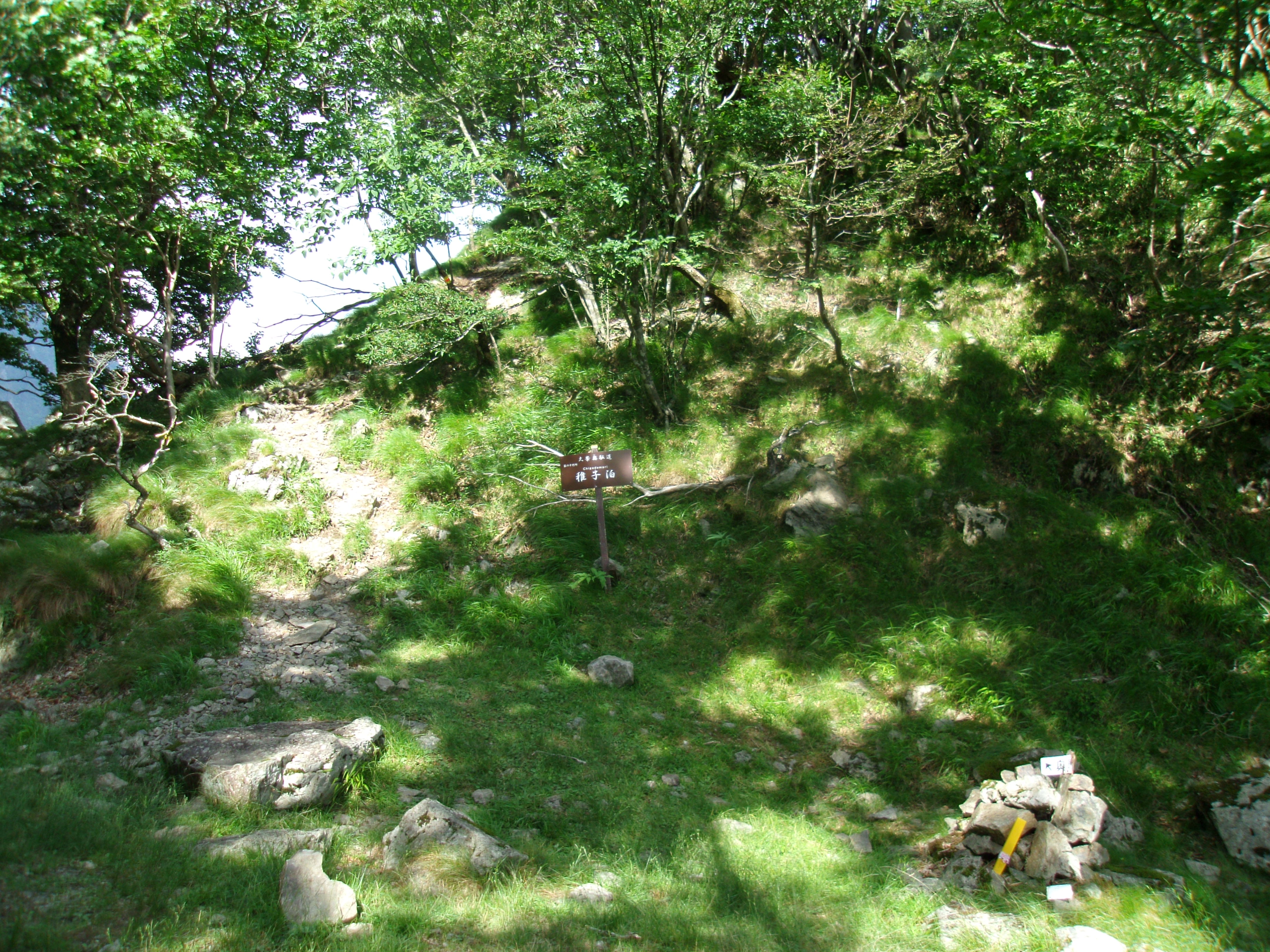 大峯奥駈道第60靡「稚児泊」